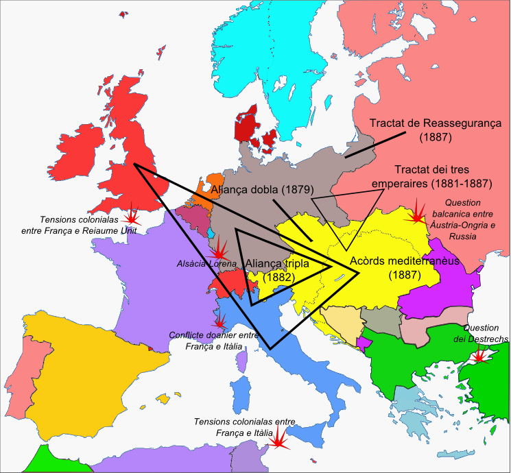 Sistèmas d'aliança de Bismarck e isolament de França.